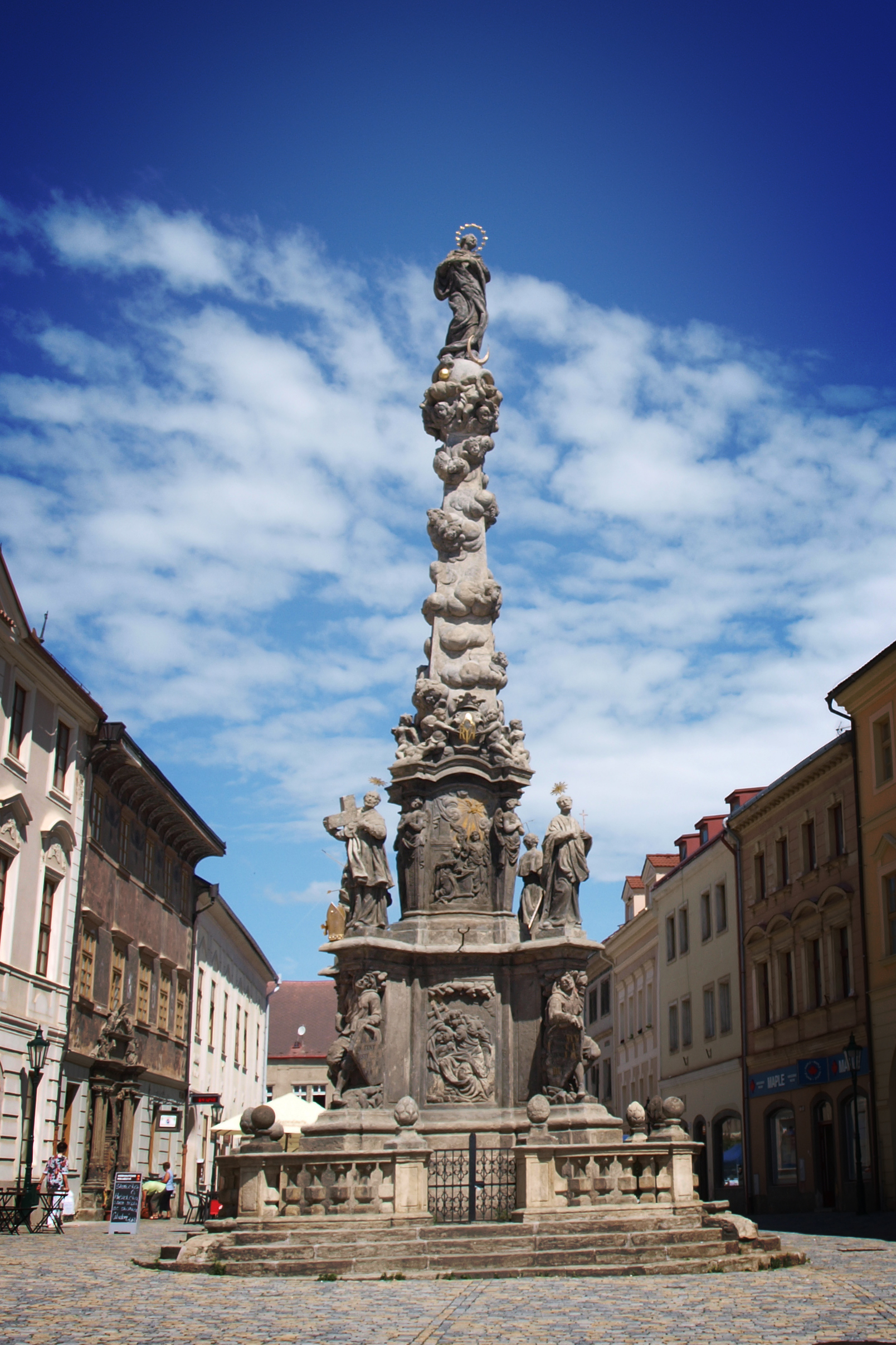 Morový sloup se sousoším Šultysova ulice, Kutná Hora Číslo rejstříku ÚSKP: 38736/2-1043